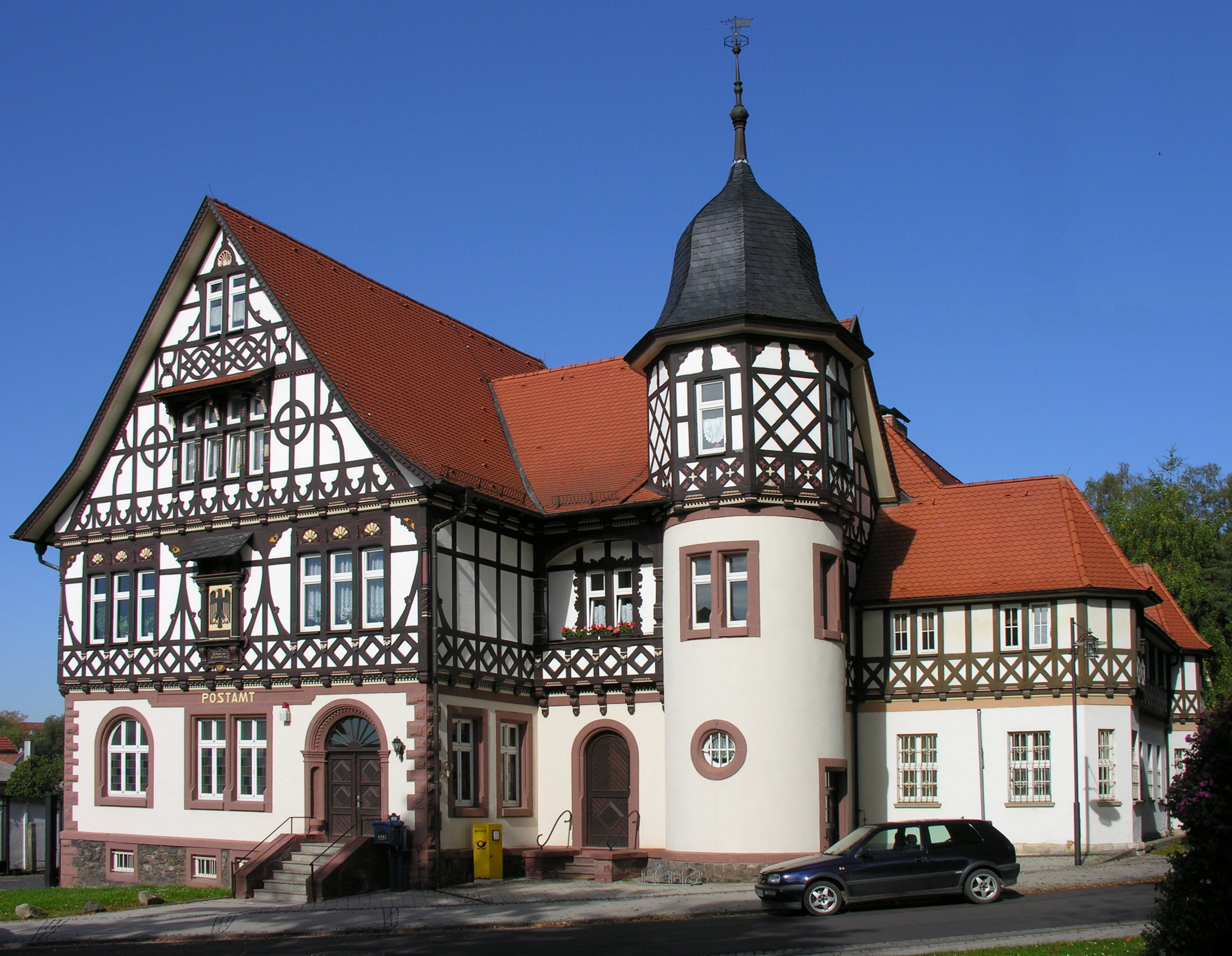 Postamt von 1895 (Denkmal) in Bad Liebenstein, eines der Kulturdenkmäler im Wartburgkreis in Thüringen - Foto 2010 Wolfgang Pehlemann DSCN5789